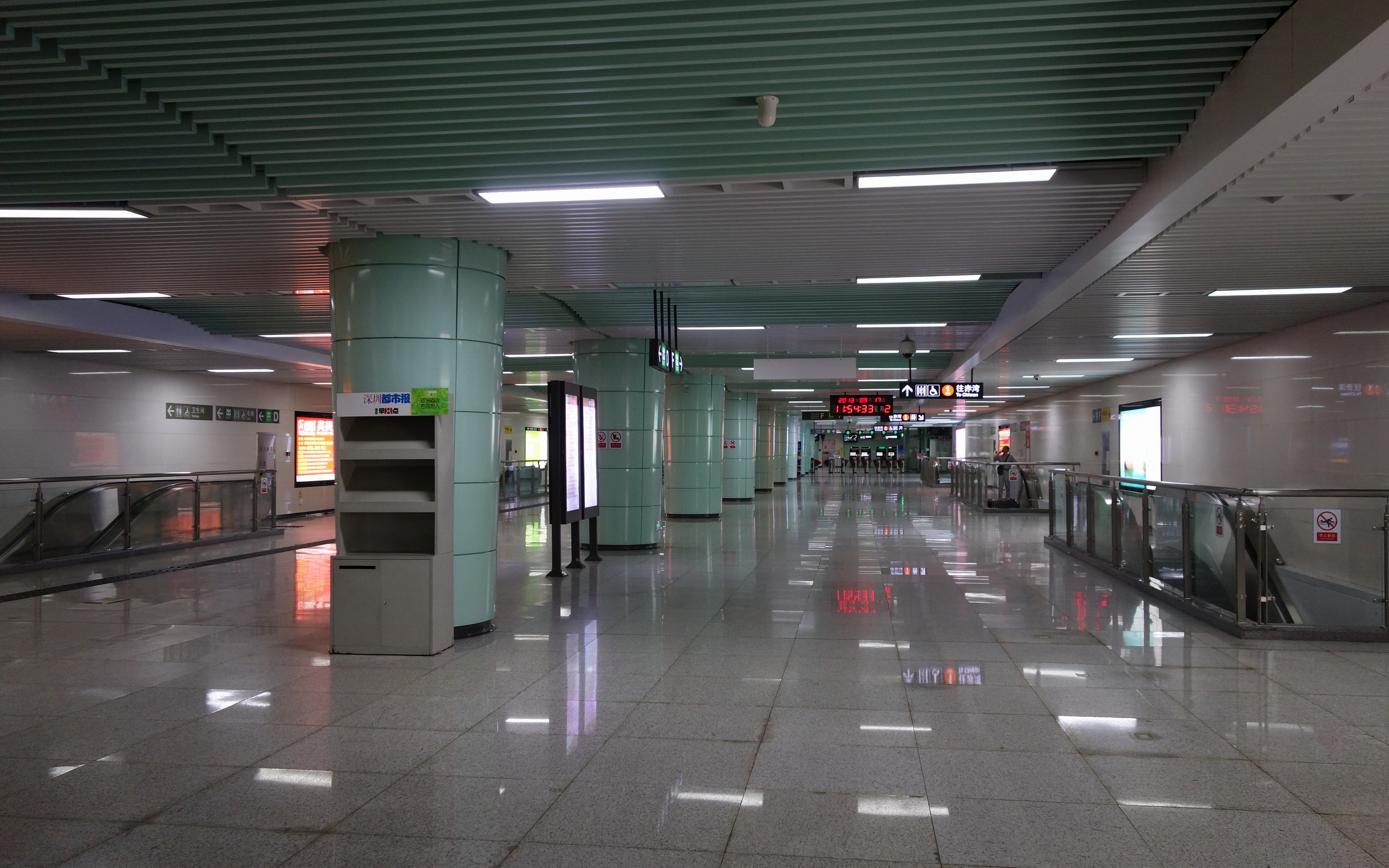 深圳地铁蛇口线景田站站厅